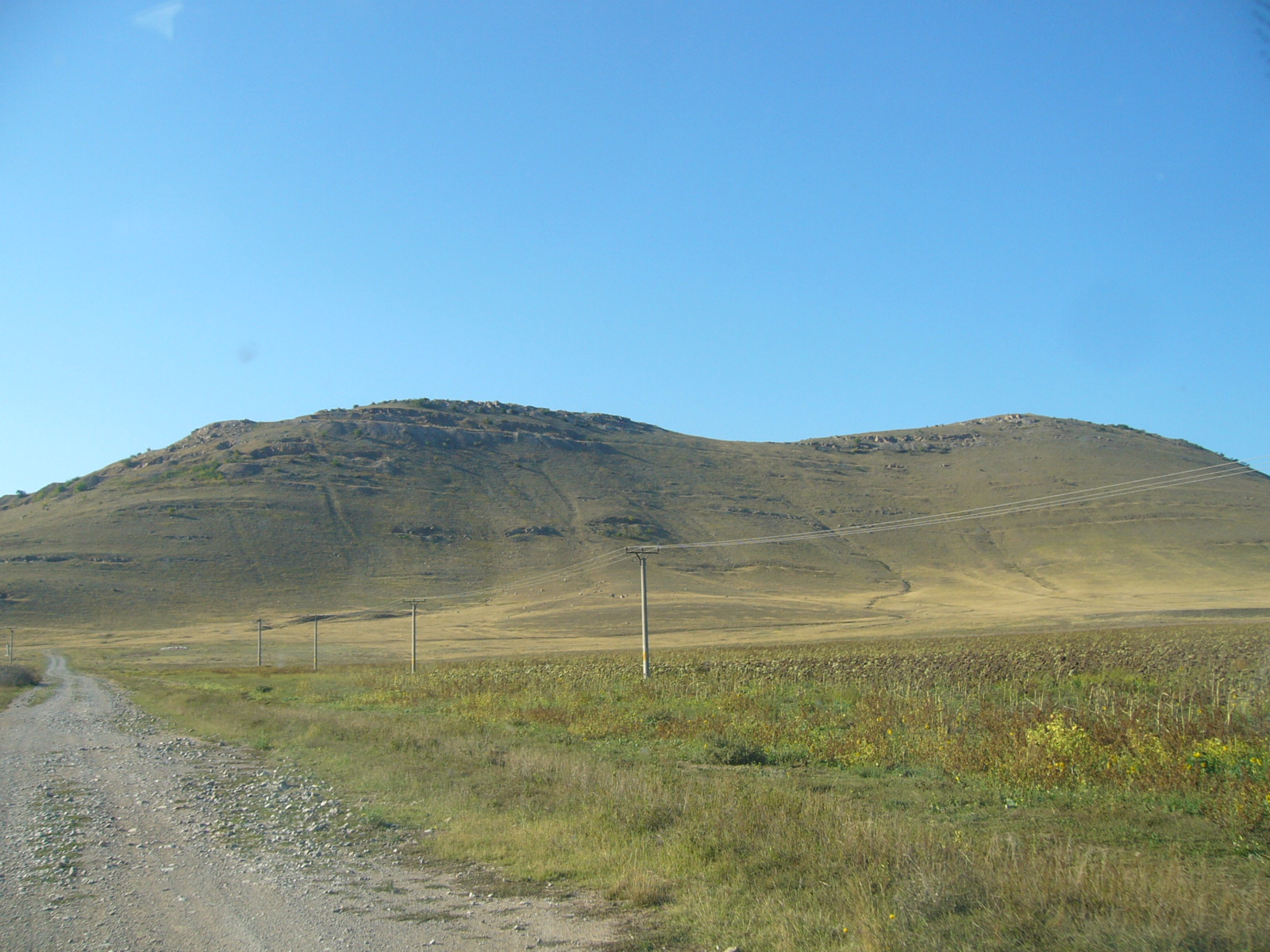 Dealul Marii, panta de Sud-Est. Locatie: Tulcea, Romania